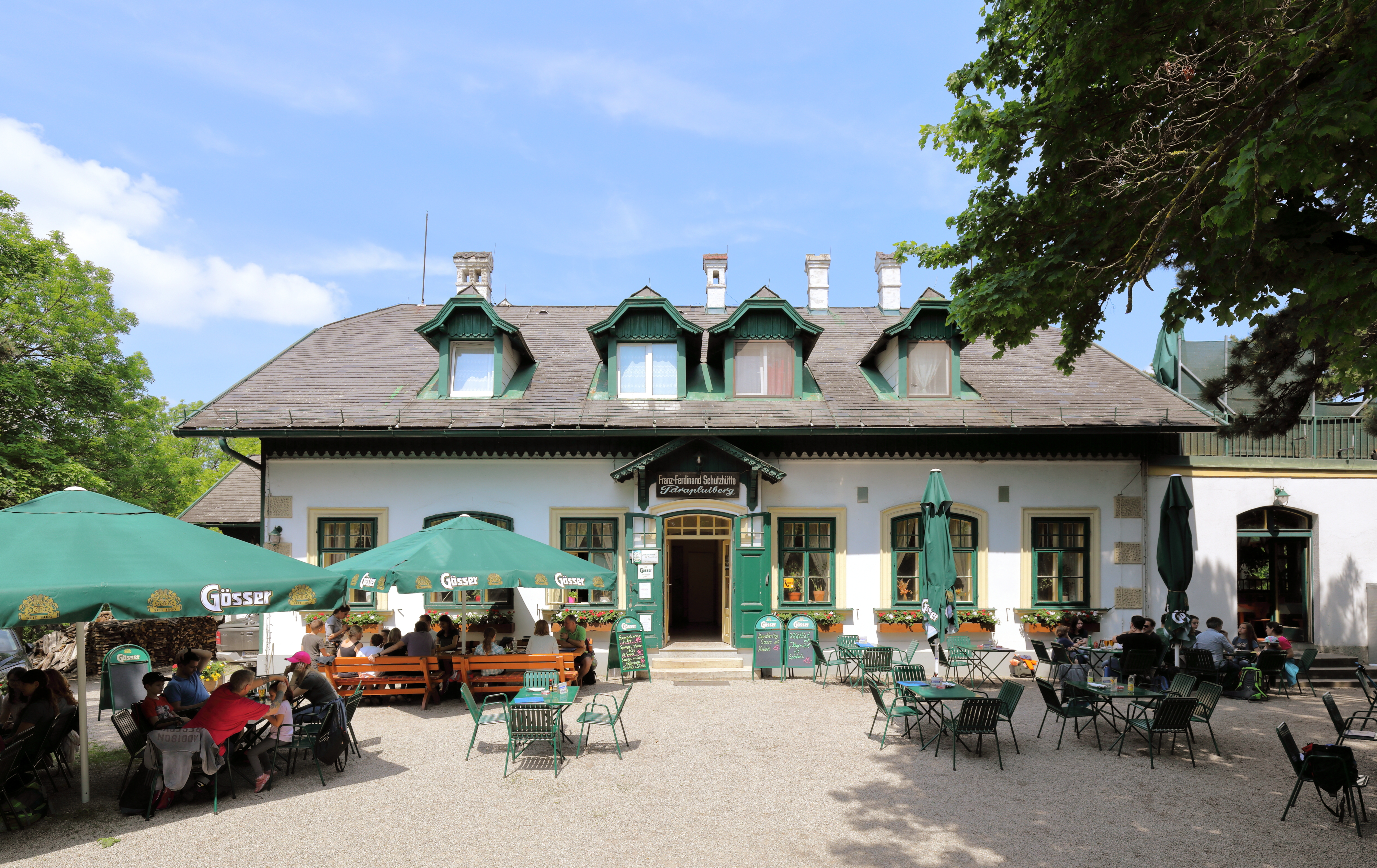 Südostansicht der Franz-Ferdinand-Hütte in der niederösterreichischen Marktgemeinde Perchtoldsdorf.Die Schutzhütte befindet sich auf 532 Meter Seehöhe am Parapluieberg, wurde 1905 erbaut und ist nach Erzherzog Franz Ferdinand benannt. 1995 wurde die im Eigentum der Marktgemeinde befindliche Hütte an das öffentliche Wasserver- und Abwasserentsorgungsnetz angeschlossen.